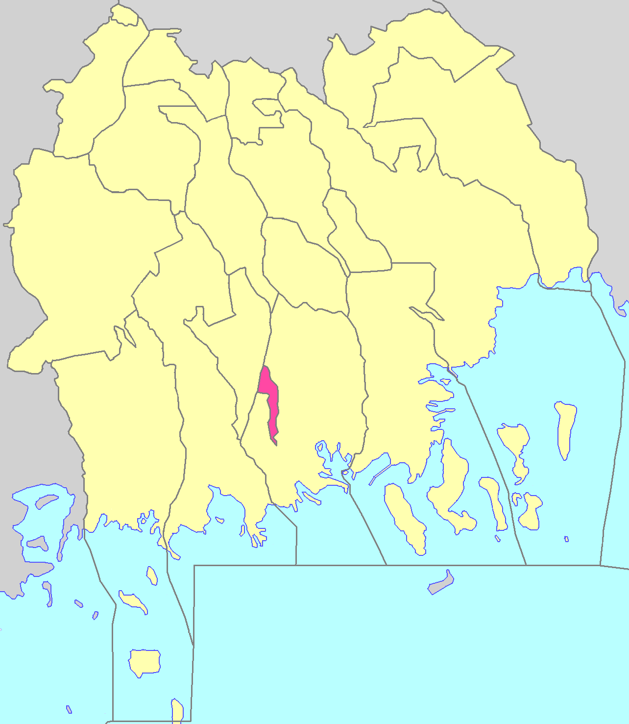 Кіровське міське поселення